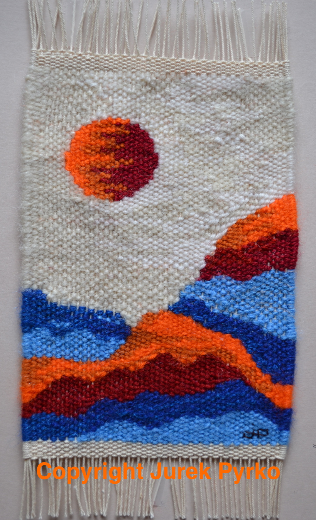 miniväv